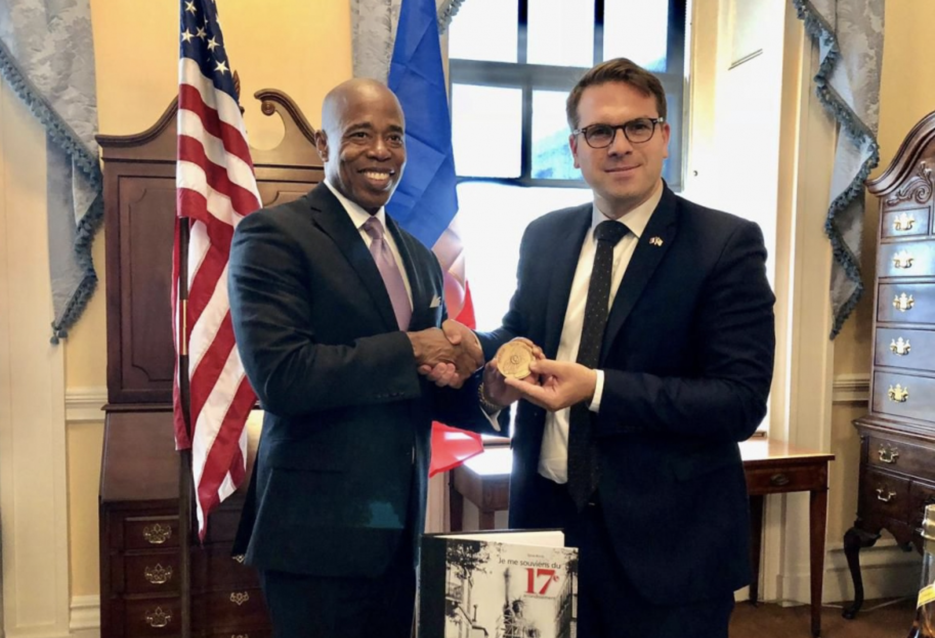 Président Eric L Adams, président de l’arrondissement Brooklyn et Geoffroy Boulard, maire du 17e arrondissement de Paris, à New York en septembre 2018.